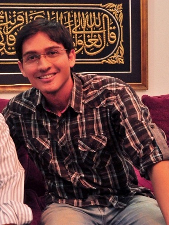 Lucky Hakim, artis asal Indonesia